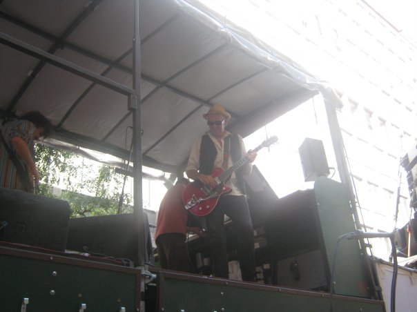 Les Balayeurs du désert @ "La invitación", Festival Stgo a Mil, enero 2010